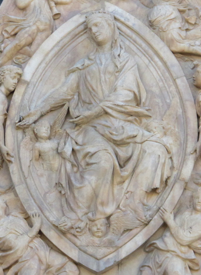 Porta della mandorla 09.6 mandorla